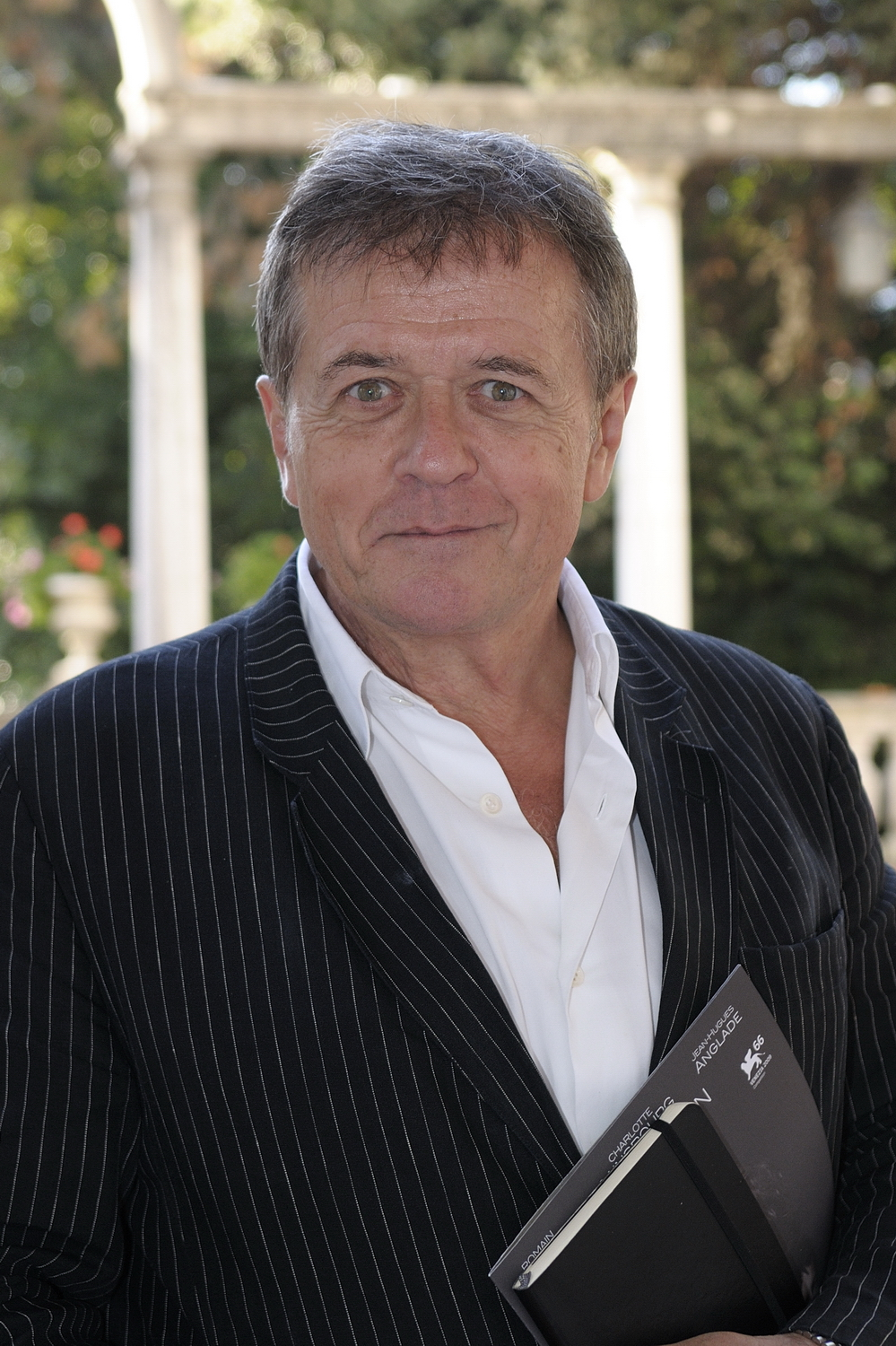 66ème Festival du Cinéma de Venise (Mostra), 4ème jour (05/09/2009) Patrice Chéreau sortant d'une interview à l'Hôtel des bains au Lido, quelques minutes avant le tapis rouge du film Persécution